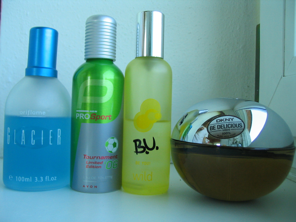 Několik lahviček parfémů. Zleva: Oriflame Glacier, Avon ProSport Tournament Limited Edition, Be You! Wild, DKNY Be Delicious pour Homme